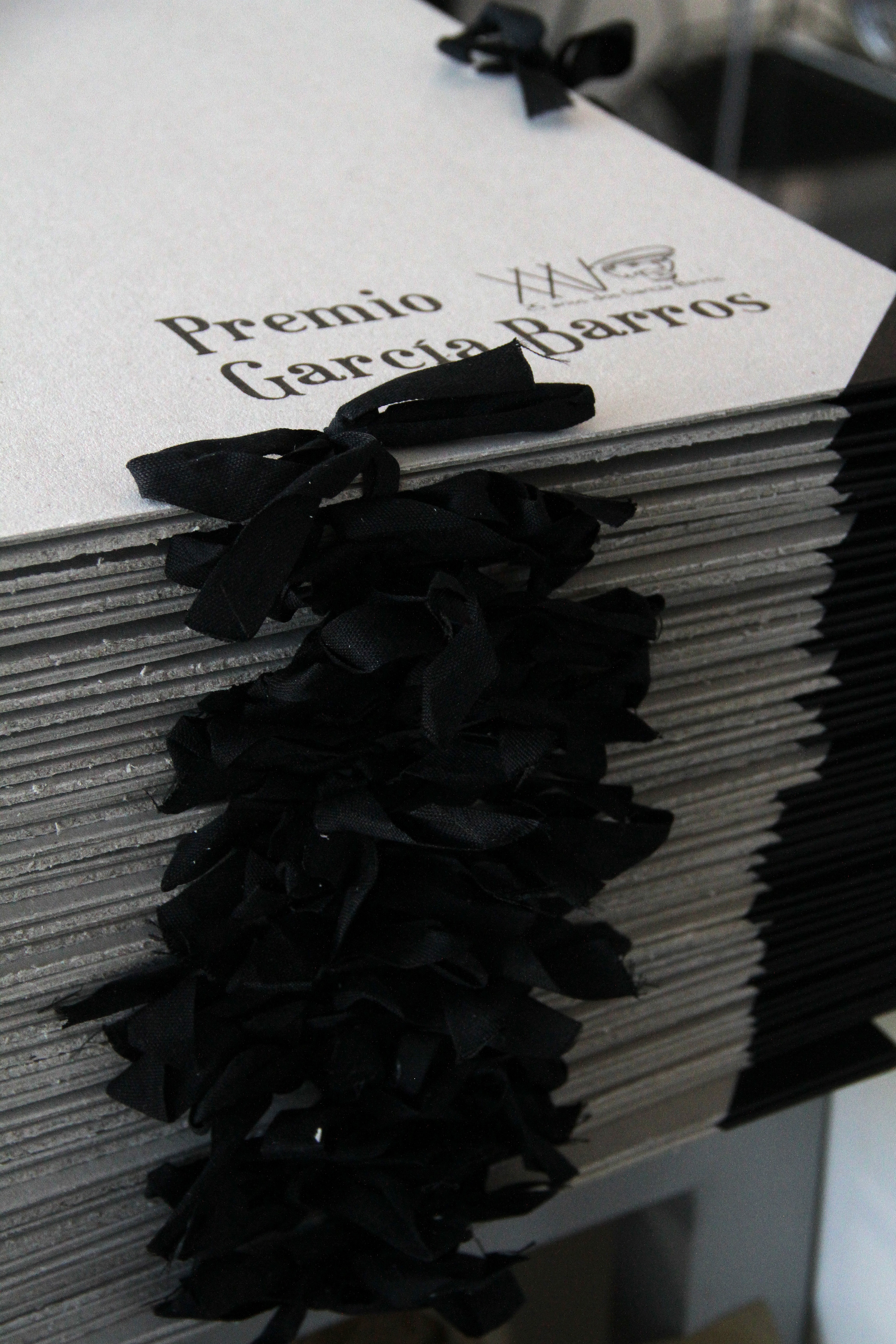 Premio Manuel García Barros. Concello da Estrada, Galiza